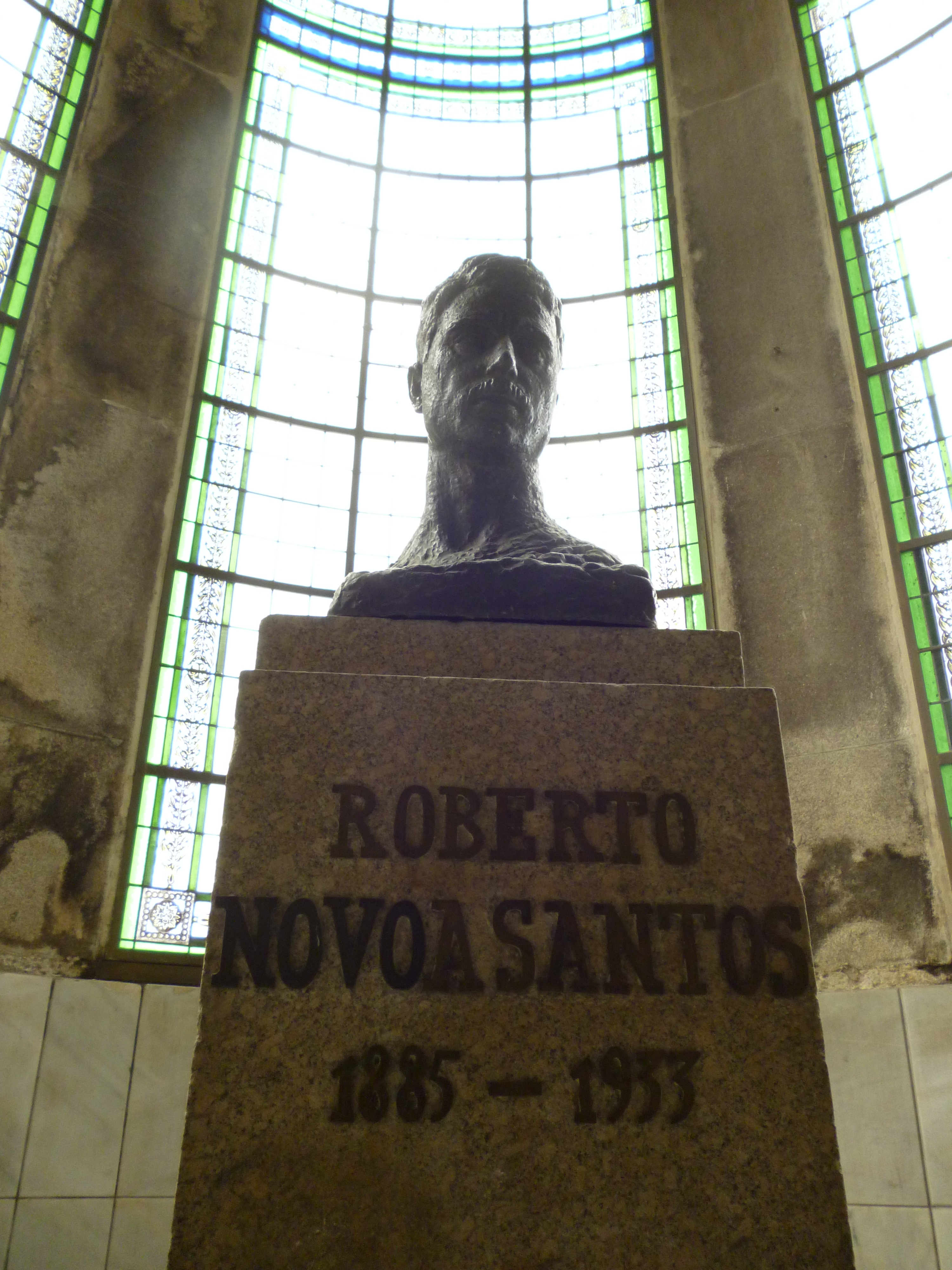 Busto de Nóvoa (Facultad Medicina, Universidad Santiago de Compostela). Escultor: Francisco Asorey, 1961